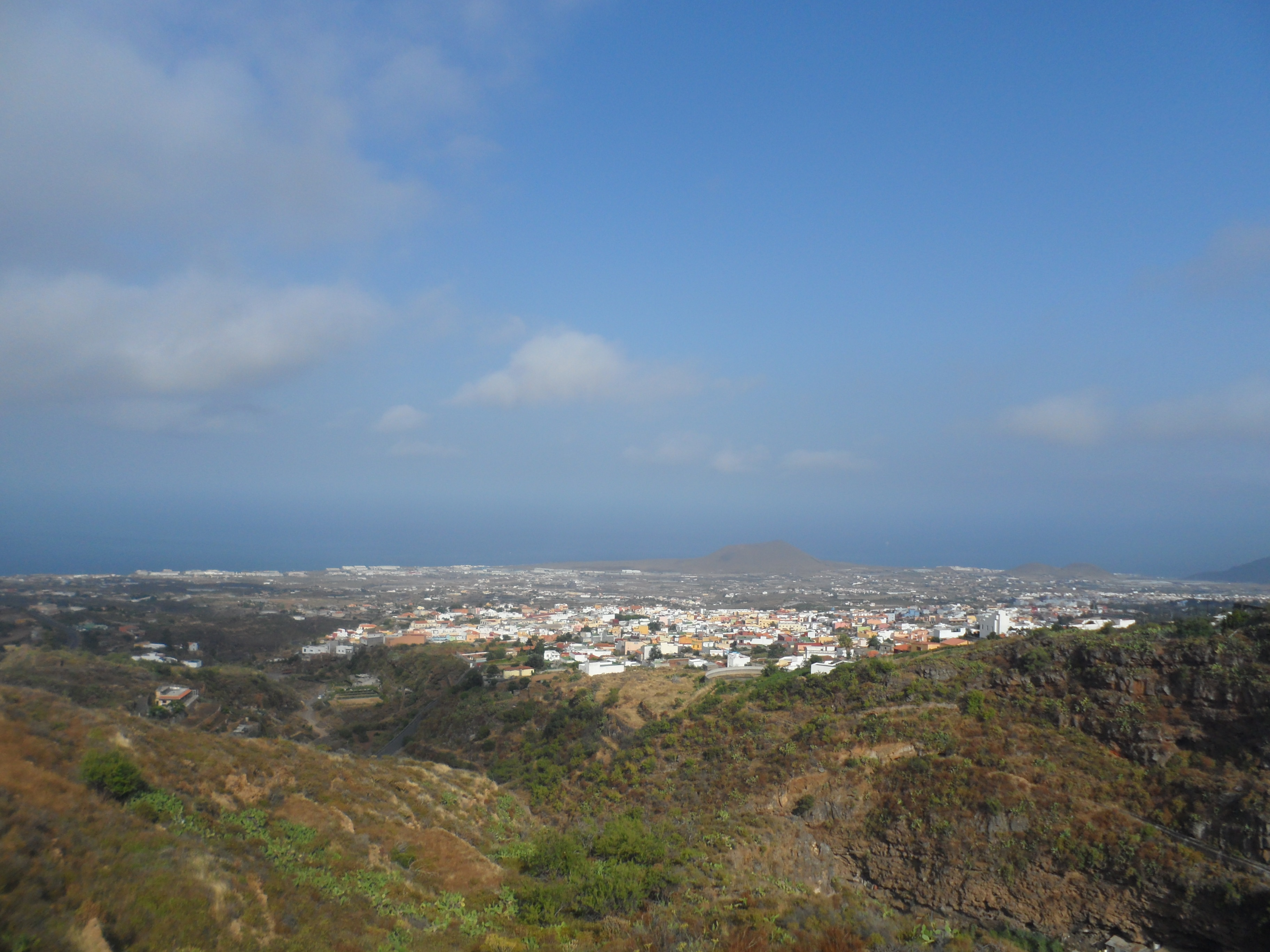 Vista panorámica de Arafo desde lo alto del barranco La Piedra